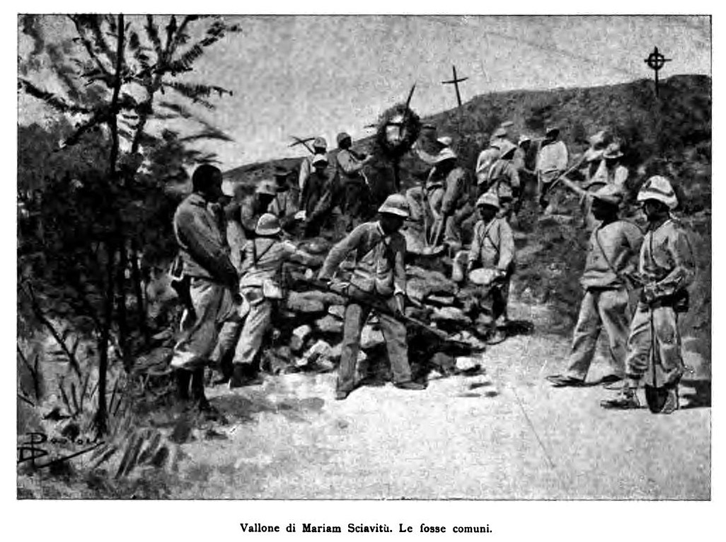 Vallone di Mariam Sciavitu. Le_fosse_communi (Adua battaglia)